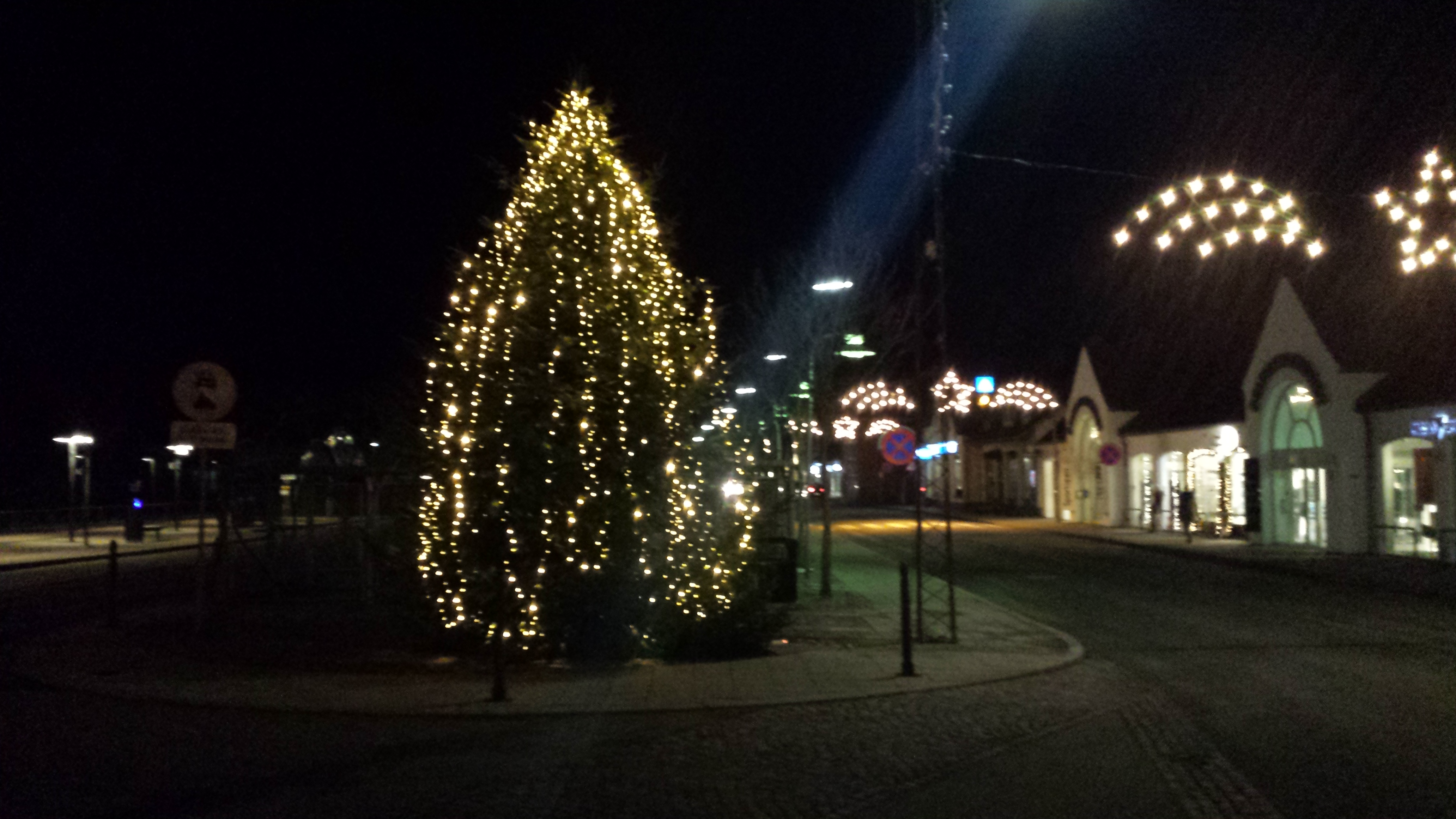 På billedet er et juletræ og julebelysning henover vejen